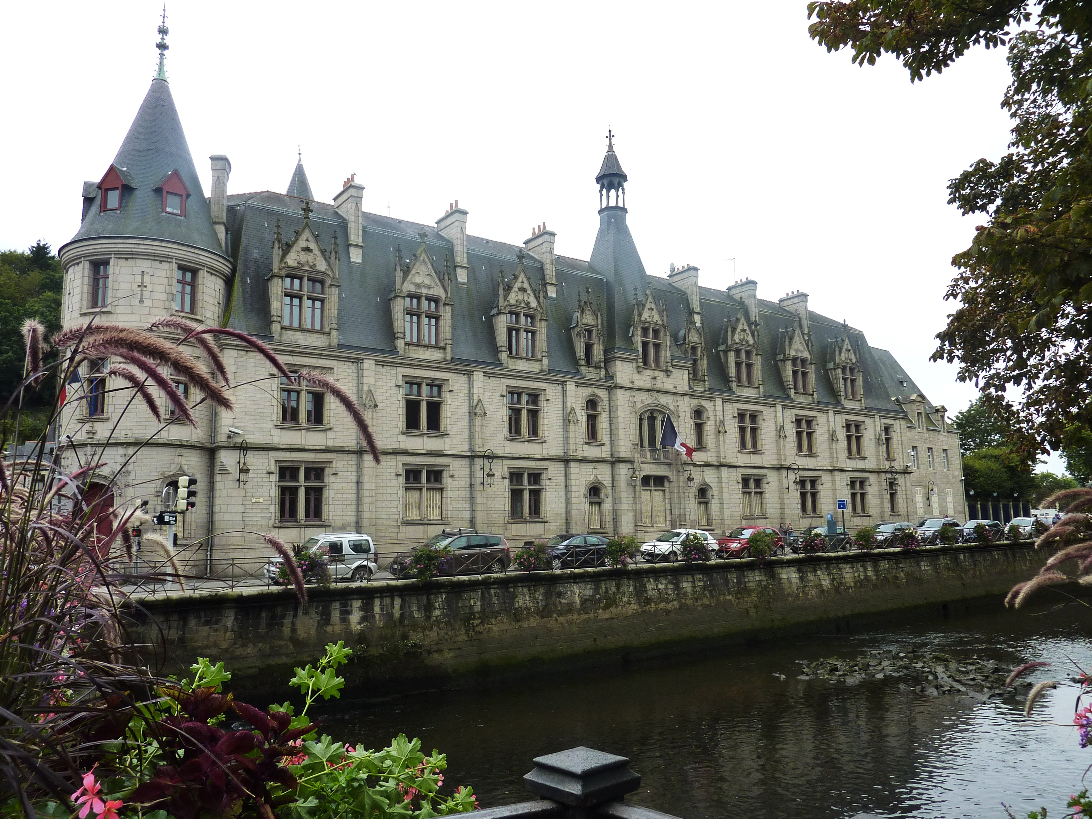 Quimper : la Préfecture du Finistère et au premier plan l'Odet